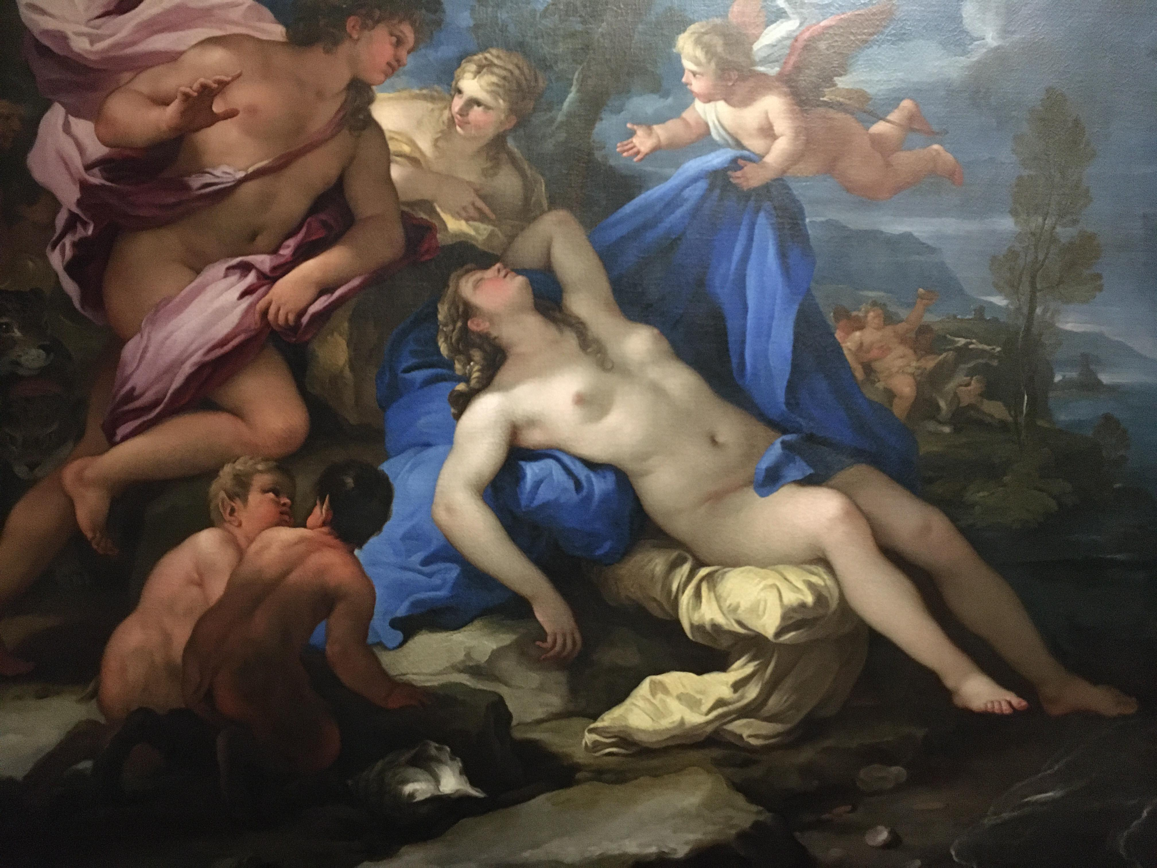 Photo prise lors de ma visite a l'exposition